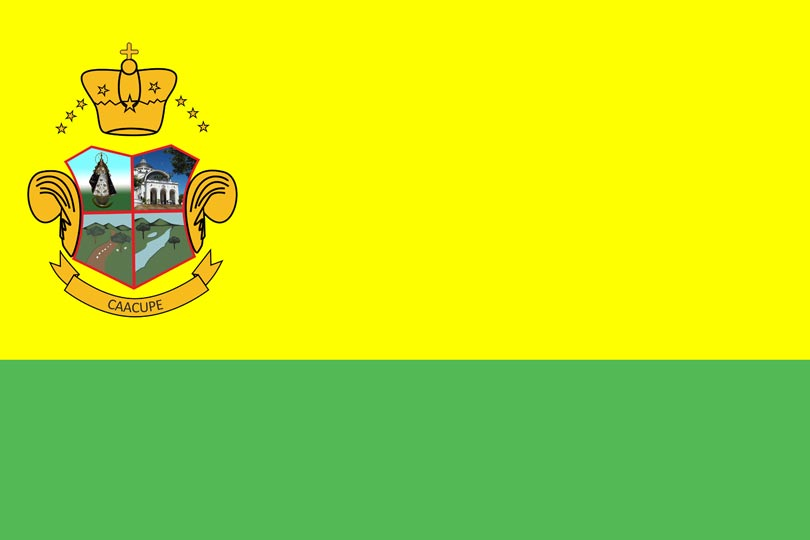 Bandera de la Ciudad de Caacupé